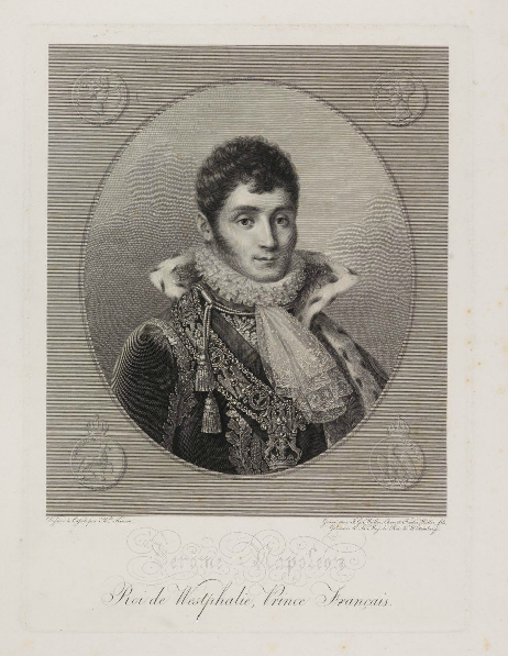 Signatur JGvMüller V 2.4035-a Inv. Nr V 4035-a PURL